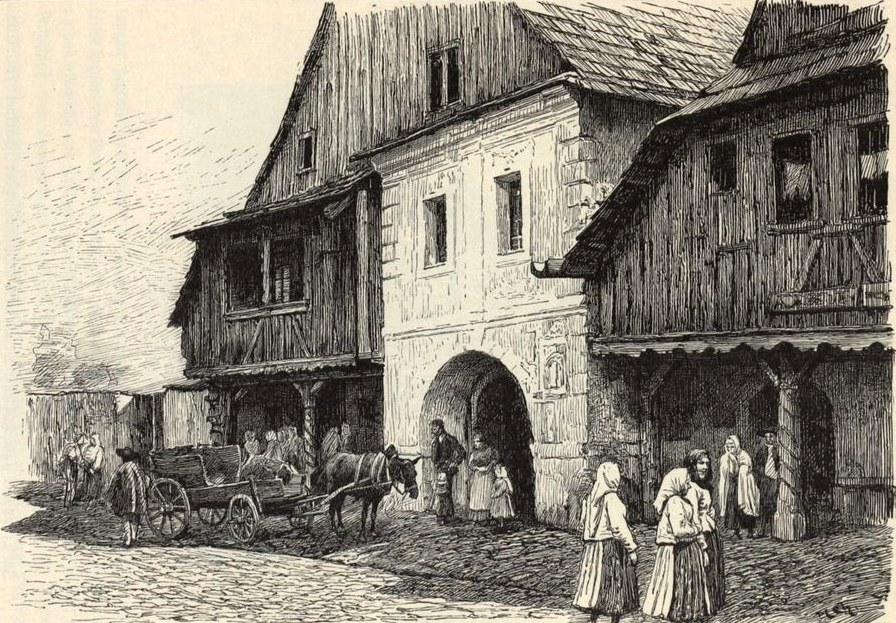 Domy v Jablunkově na konci 19. století